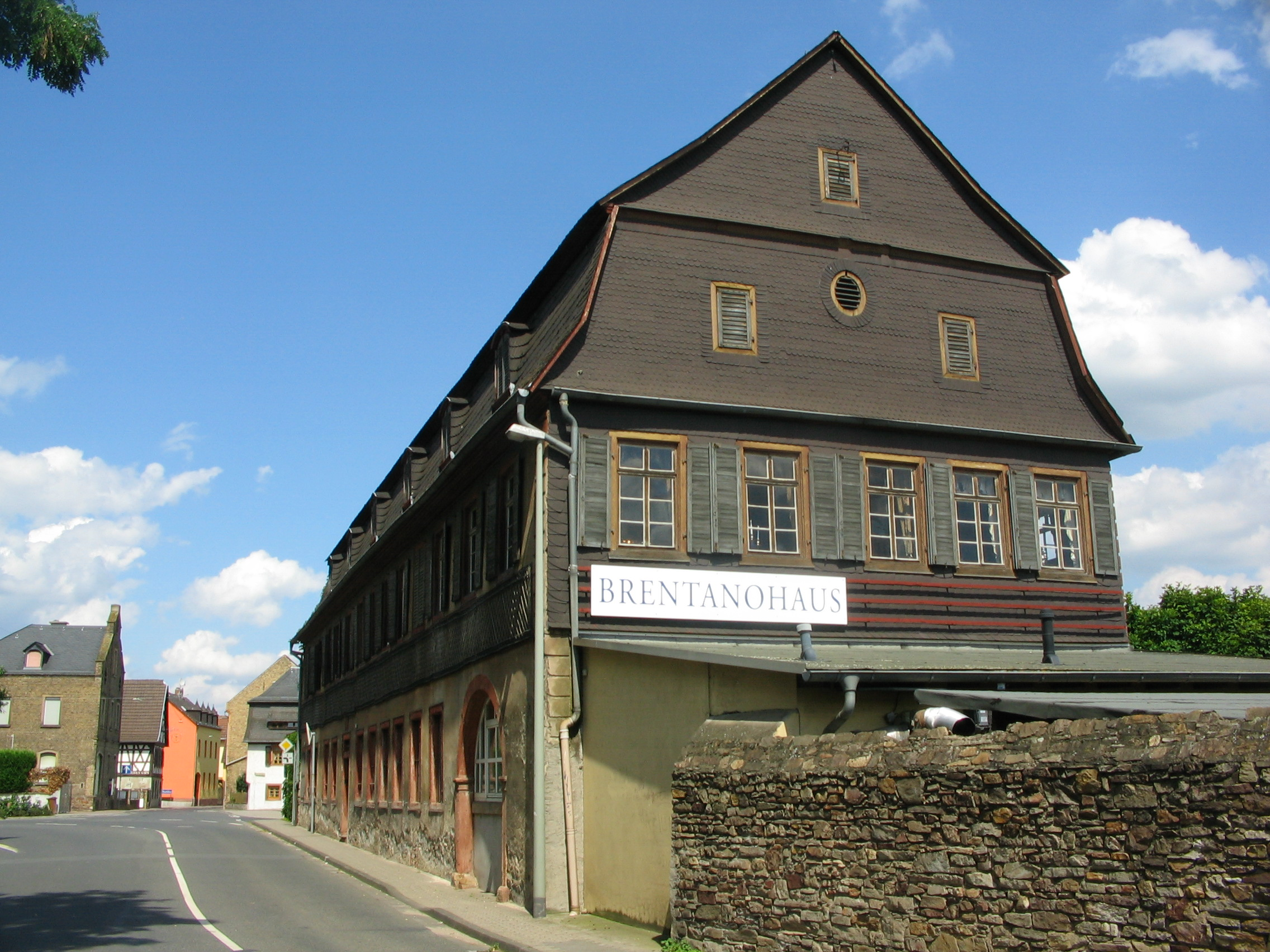 Brentanohaus an der Hauptstraße von Winkel im Rheingau, Blick von Westen.